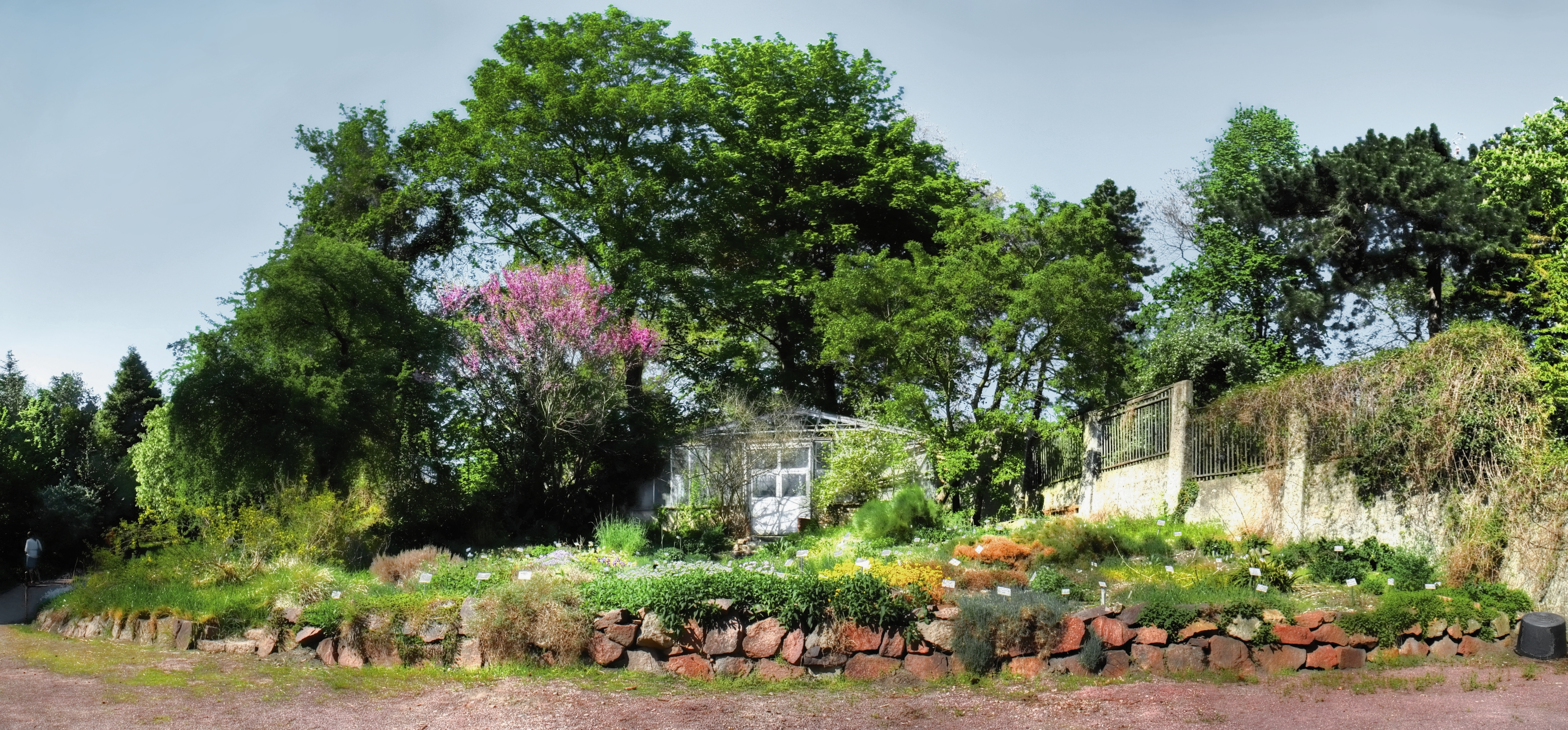 Panorama eines Teils des Botanischen Gartens zu Halle/Saale